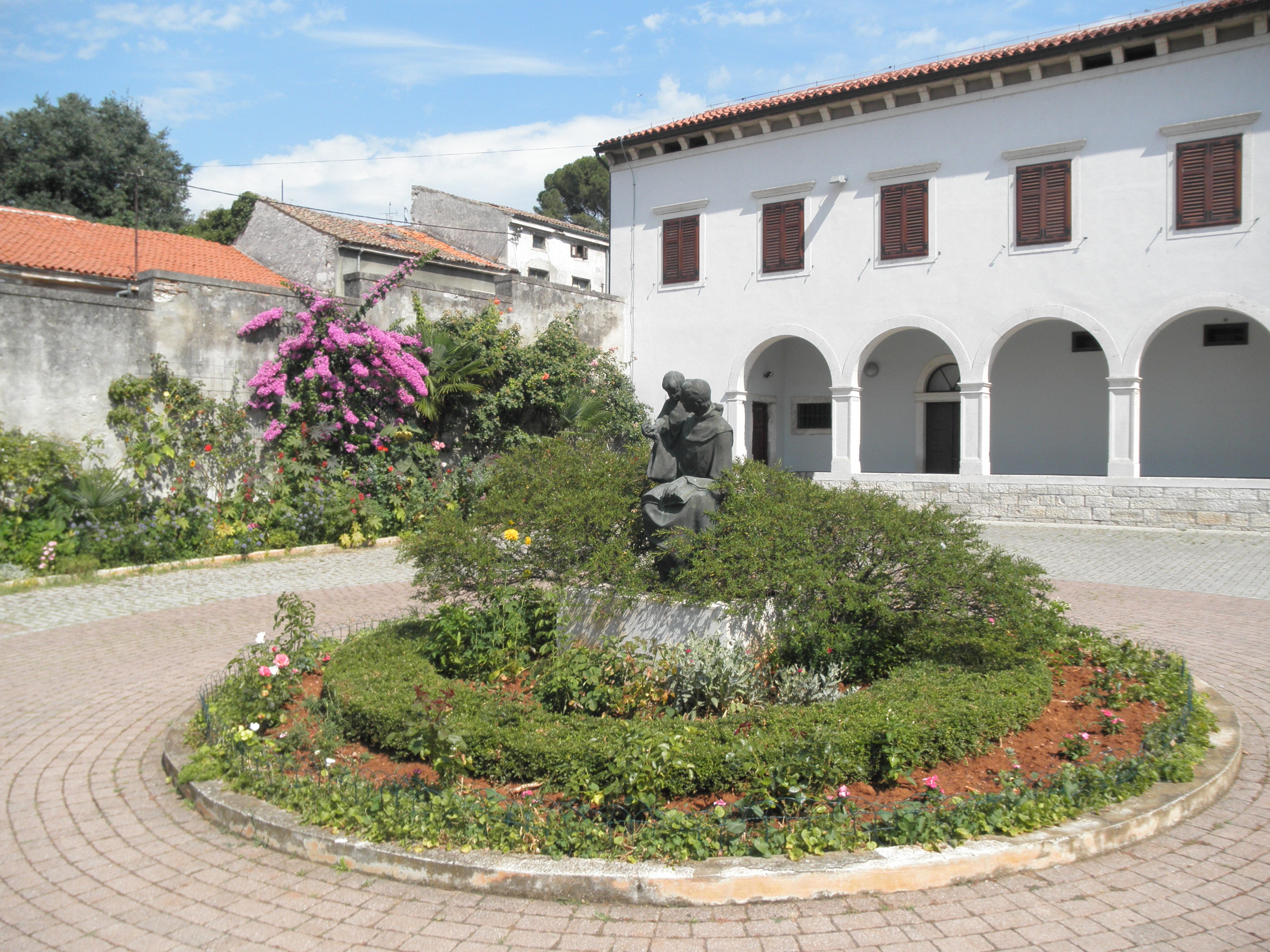 Korto de la preĝejo Sankta Antonio de Padovo en Pula, Istrio